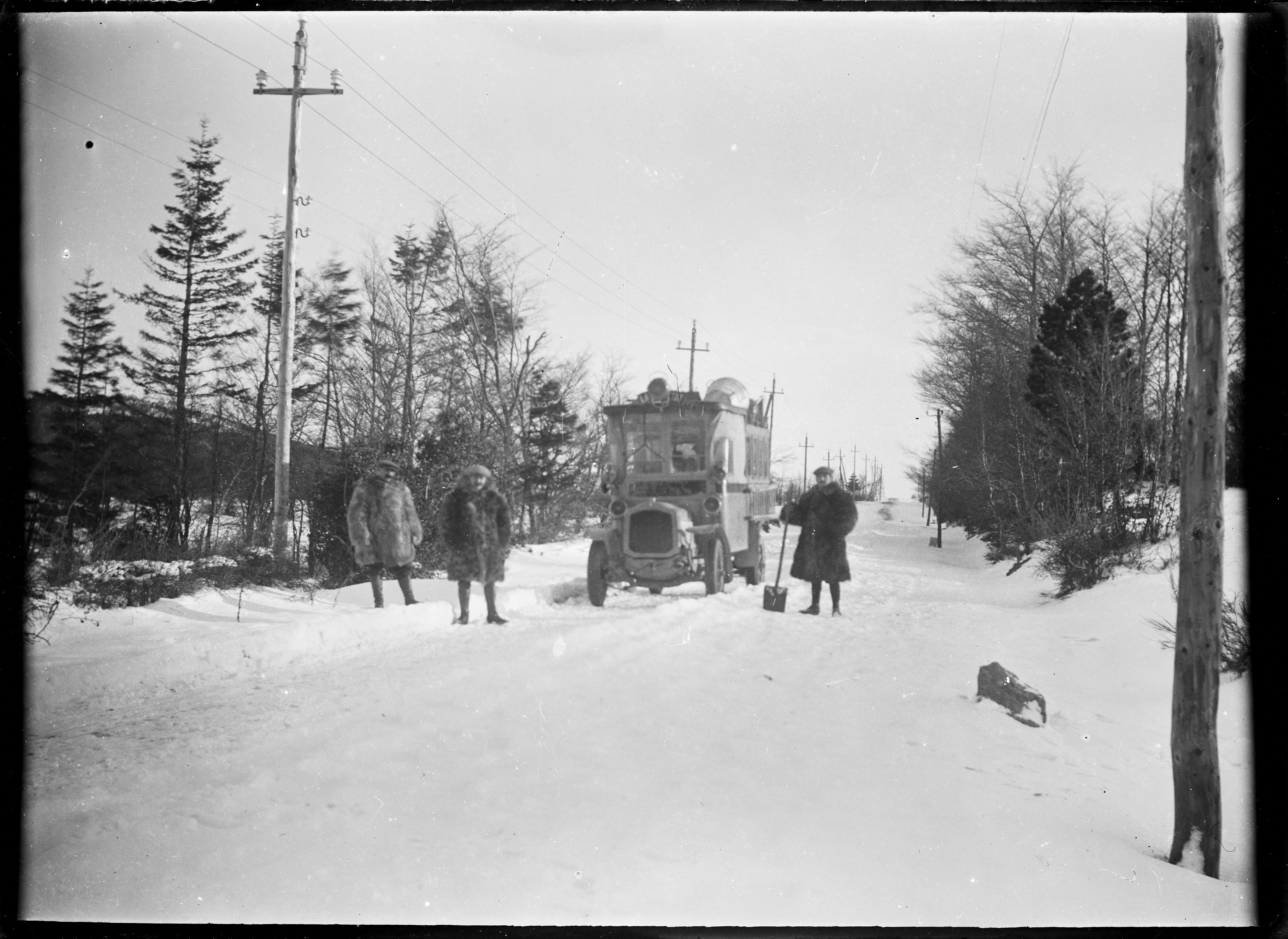 Trois hommes déblaient la route enneigée devant un autobus de marque Saurer, sur la RD 907 au Col du Cabaretou.